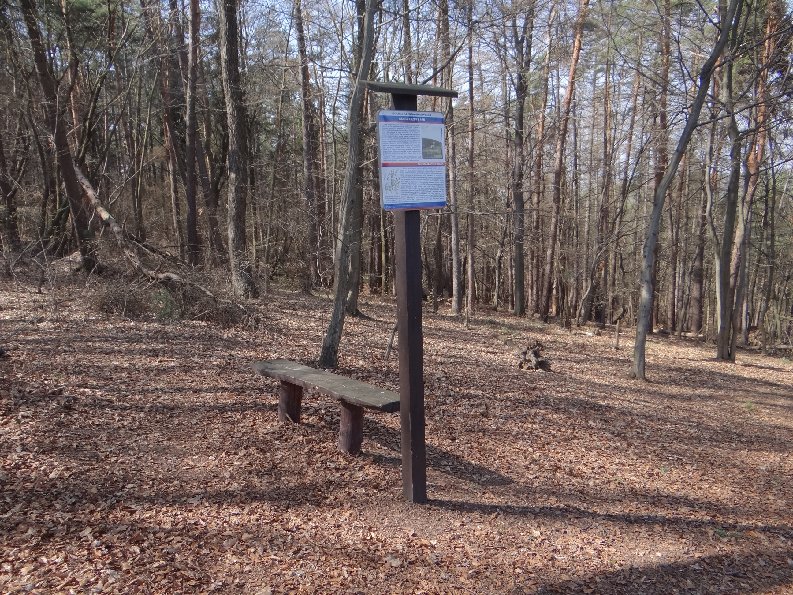 Krzywy Sąd w Aleksandrowicach